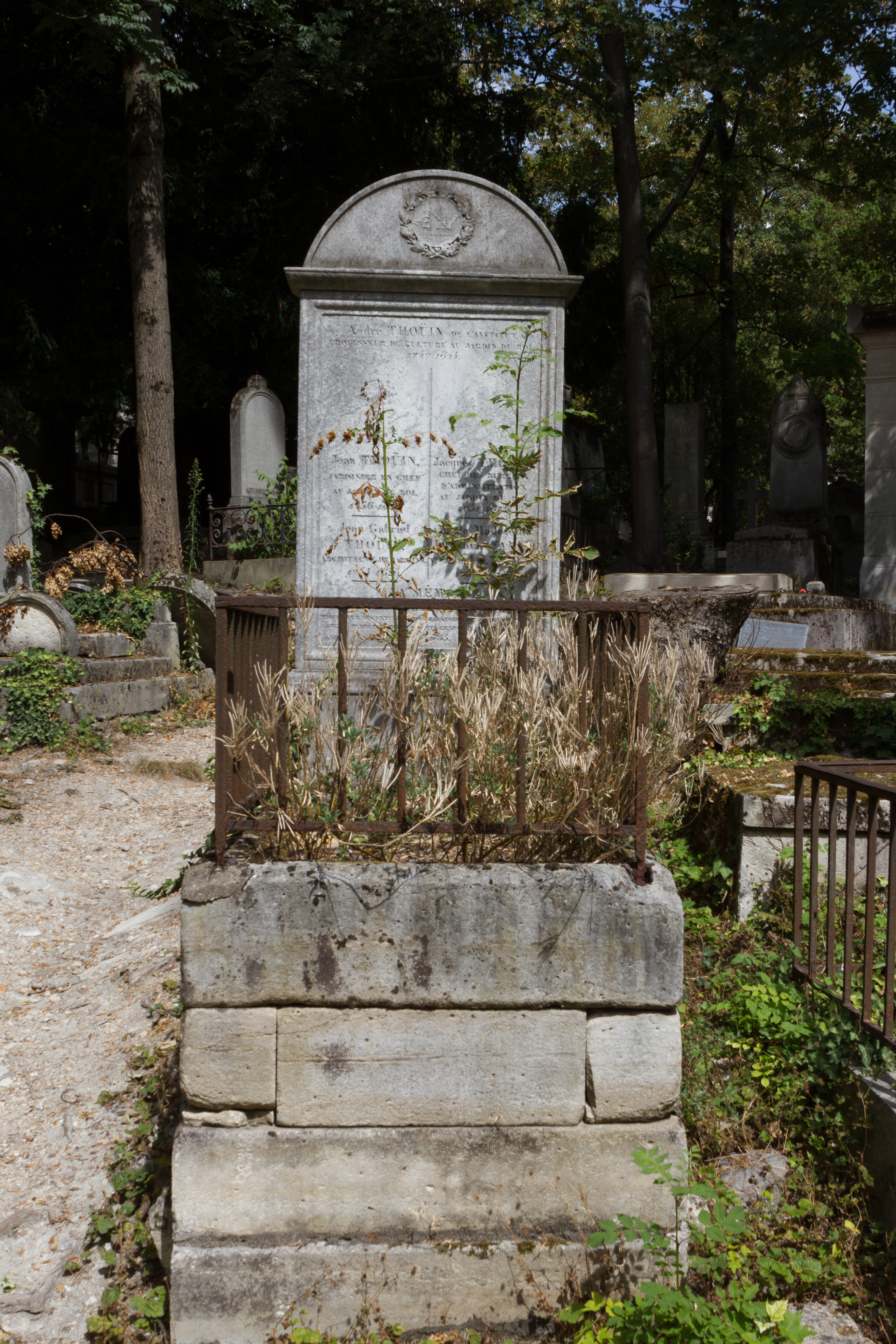 Sépulture d'André Thouin (1747-1824), naturaliste, professeur de culture au jardin du Roi, membre de l'Institut.